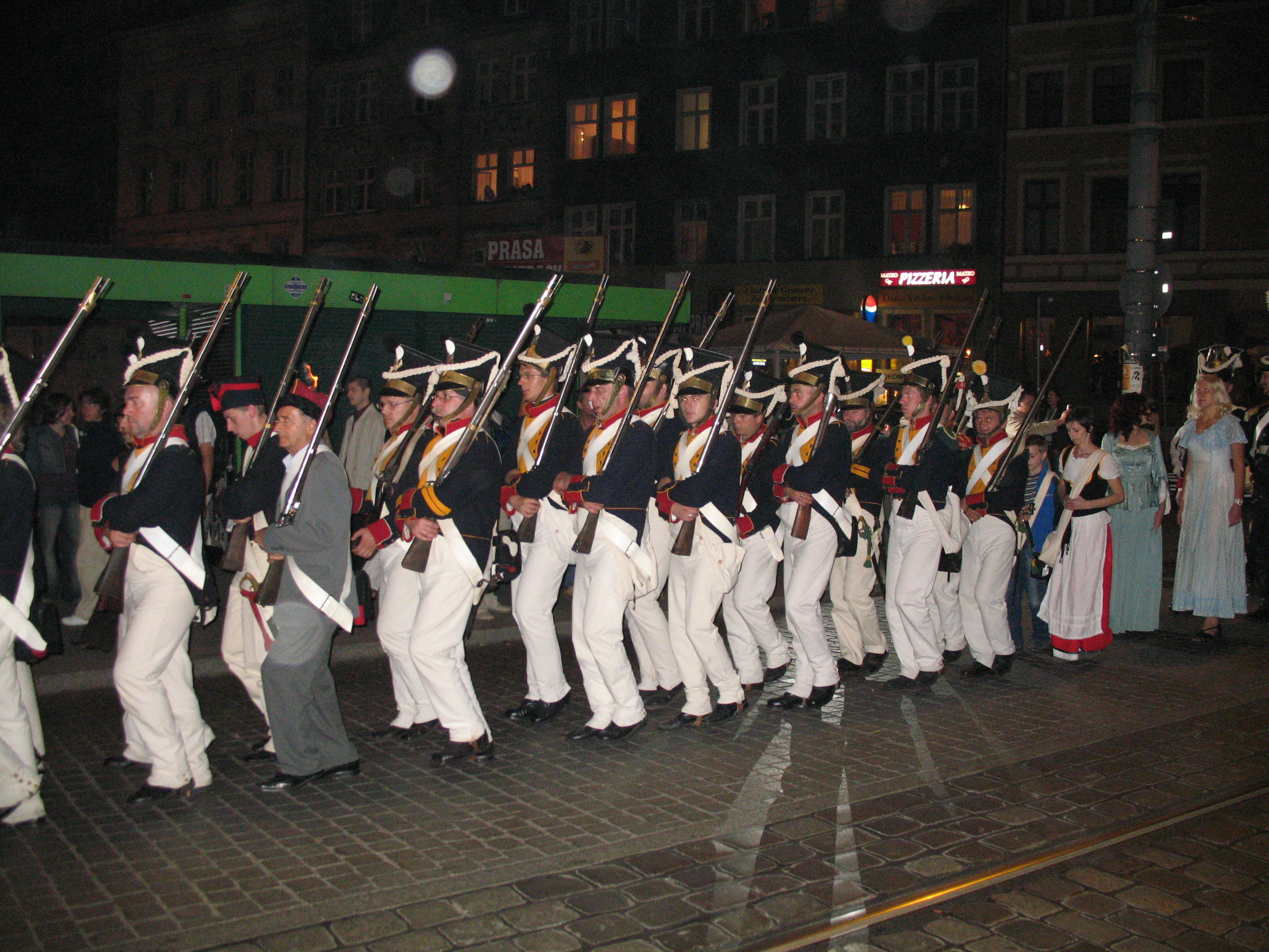 Zdjęcie z obchodów Weekendu z Napoleonem na Trakcie Królewsko-Cesarskim w Poznaniu